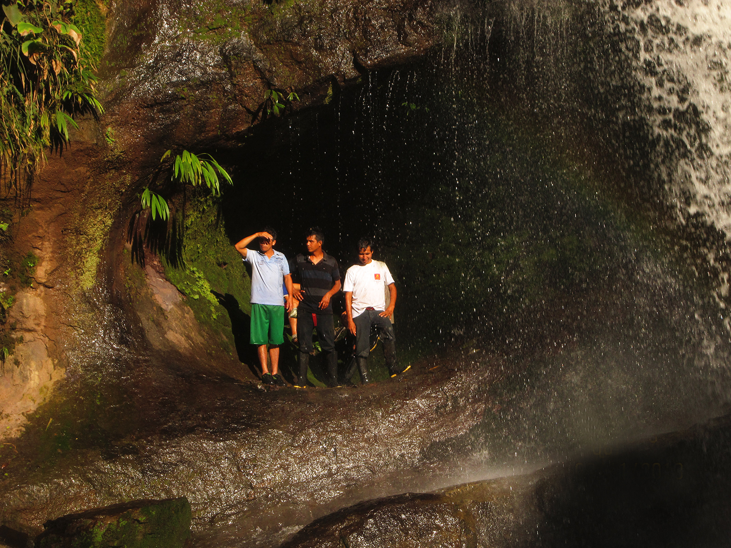 Cueva de Garganta de Loro